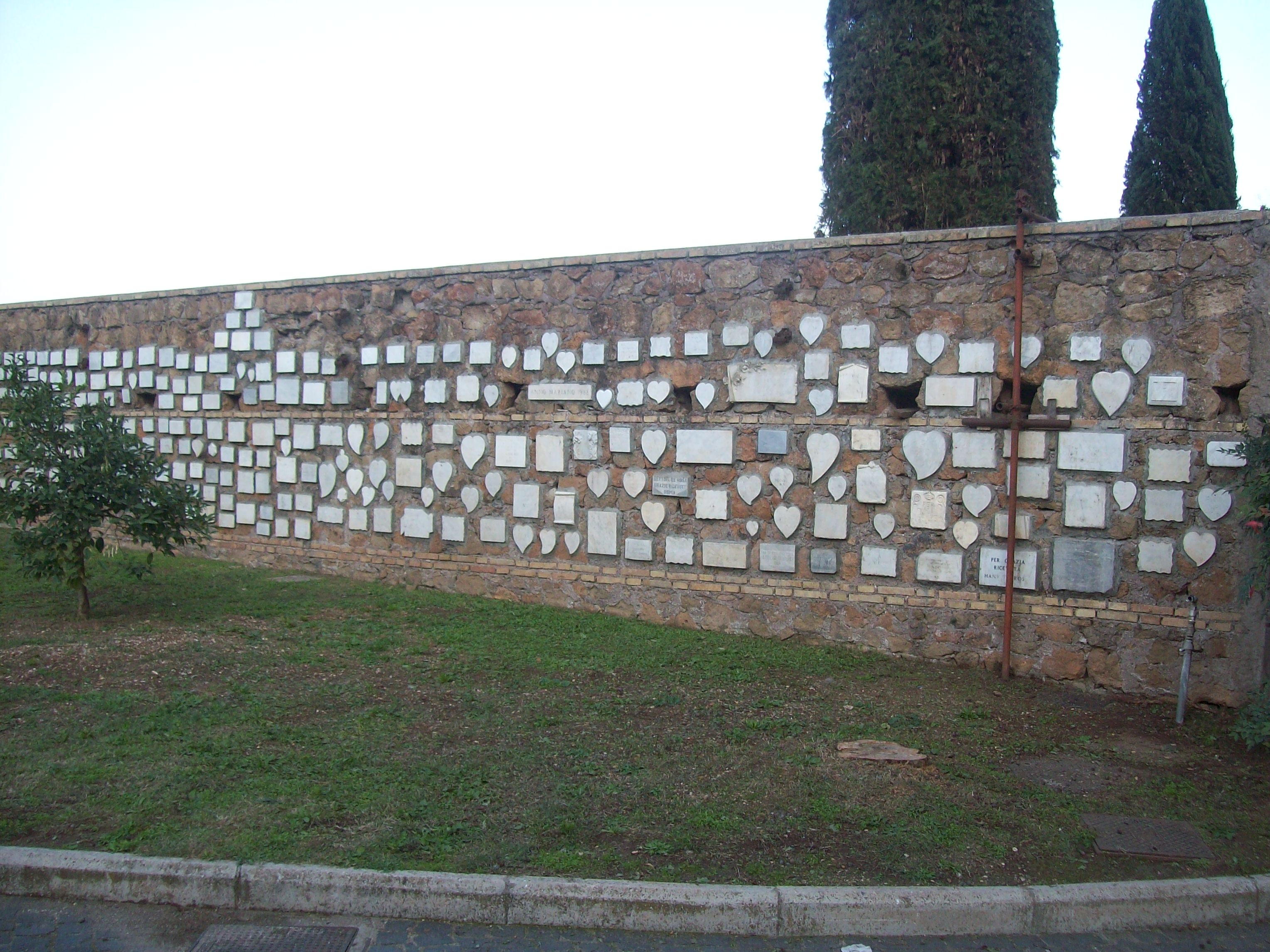 Roma, Santuario del Divino Amore - Il muro di cinta contiguo alla torre e gli ex-voto